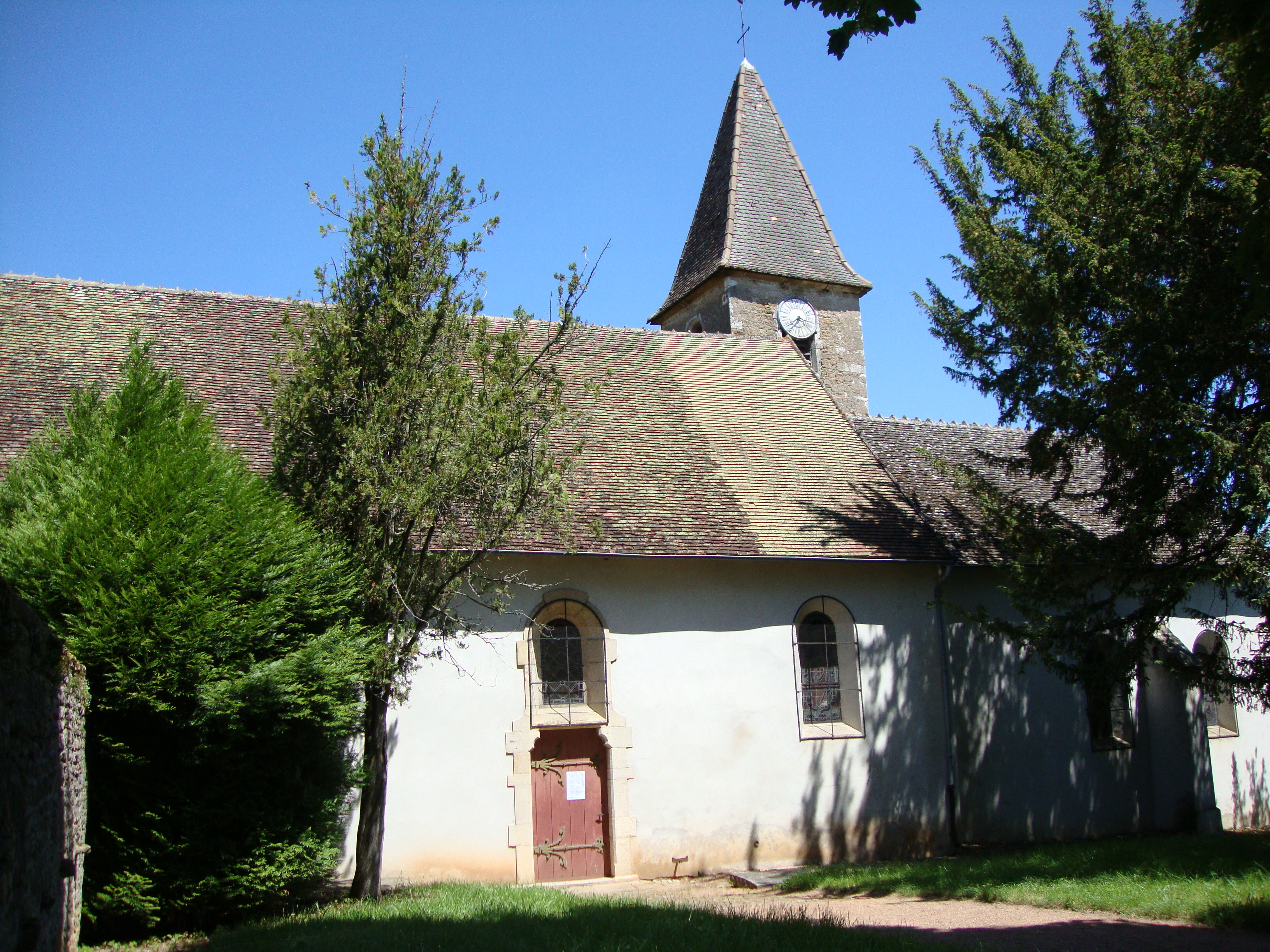 Chenôves (Saône-et-Loire, Fr) church.